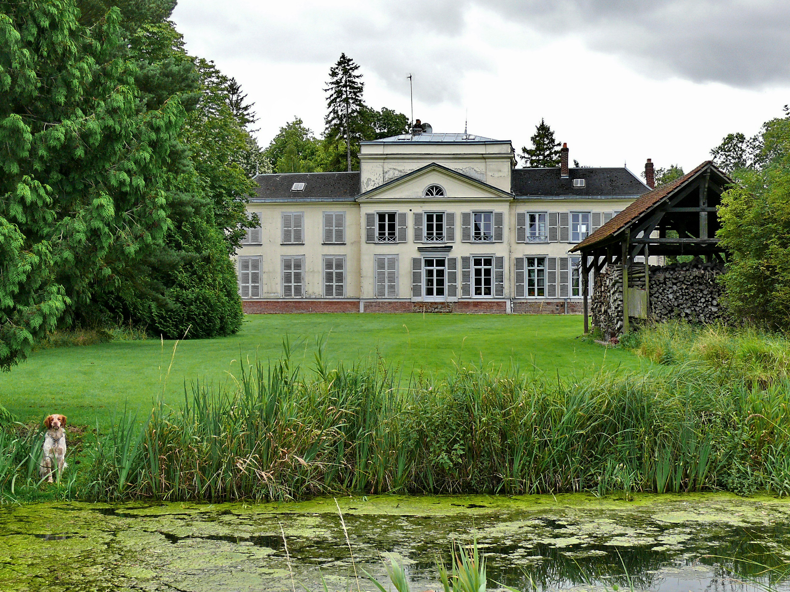 Conty : façade principale du Château de Luzières (fin du XVIIIe siècle)